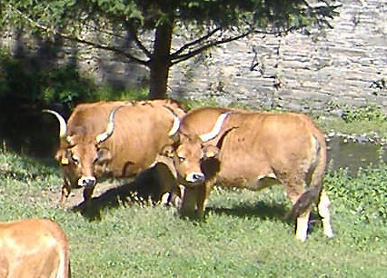 Ejemplares de raza cachena en los alrededores del monasterio de Samos, provincia de Lugo, España.